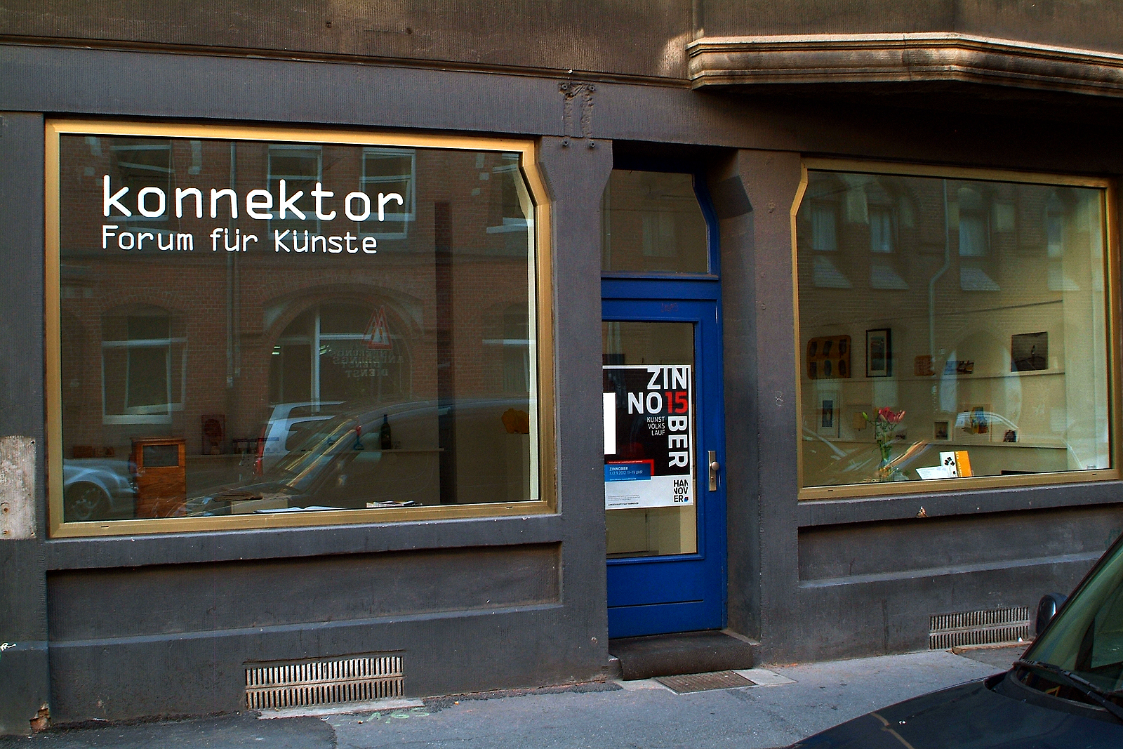 Atelier-Schaufensterfront konnektor - Forum für Künste, Kötnerholzweg 11 in Hannover, Stadtteil Linden-Nord ...